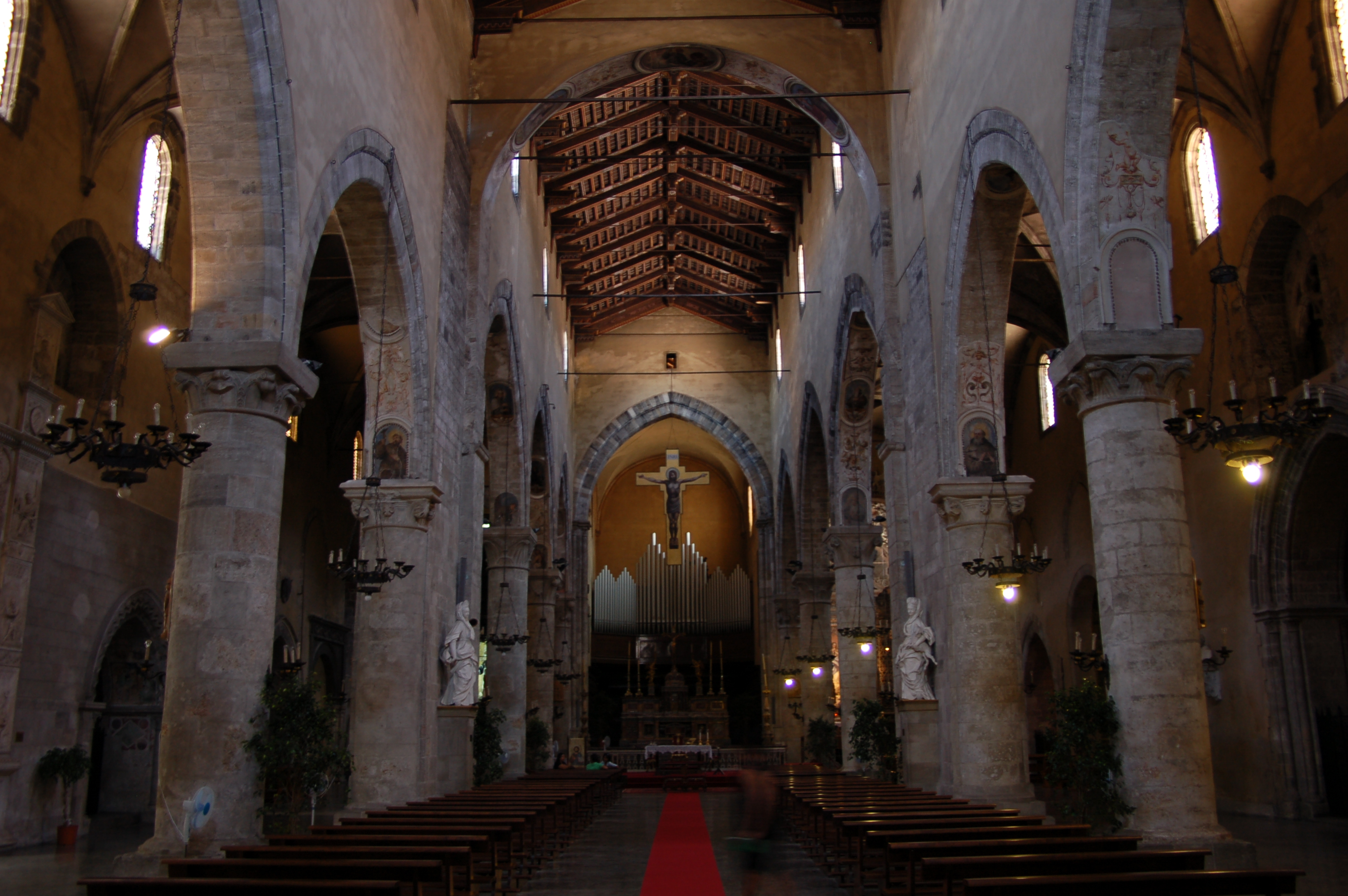 San Francesco d'Assisi Palermo